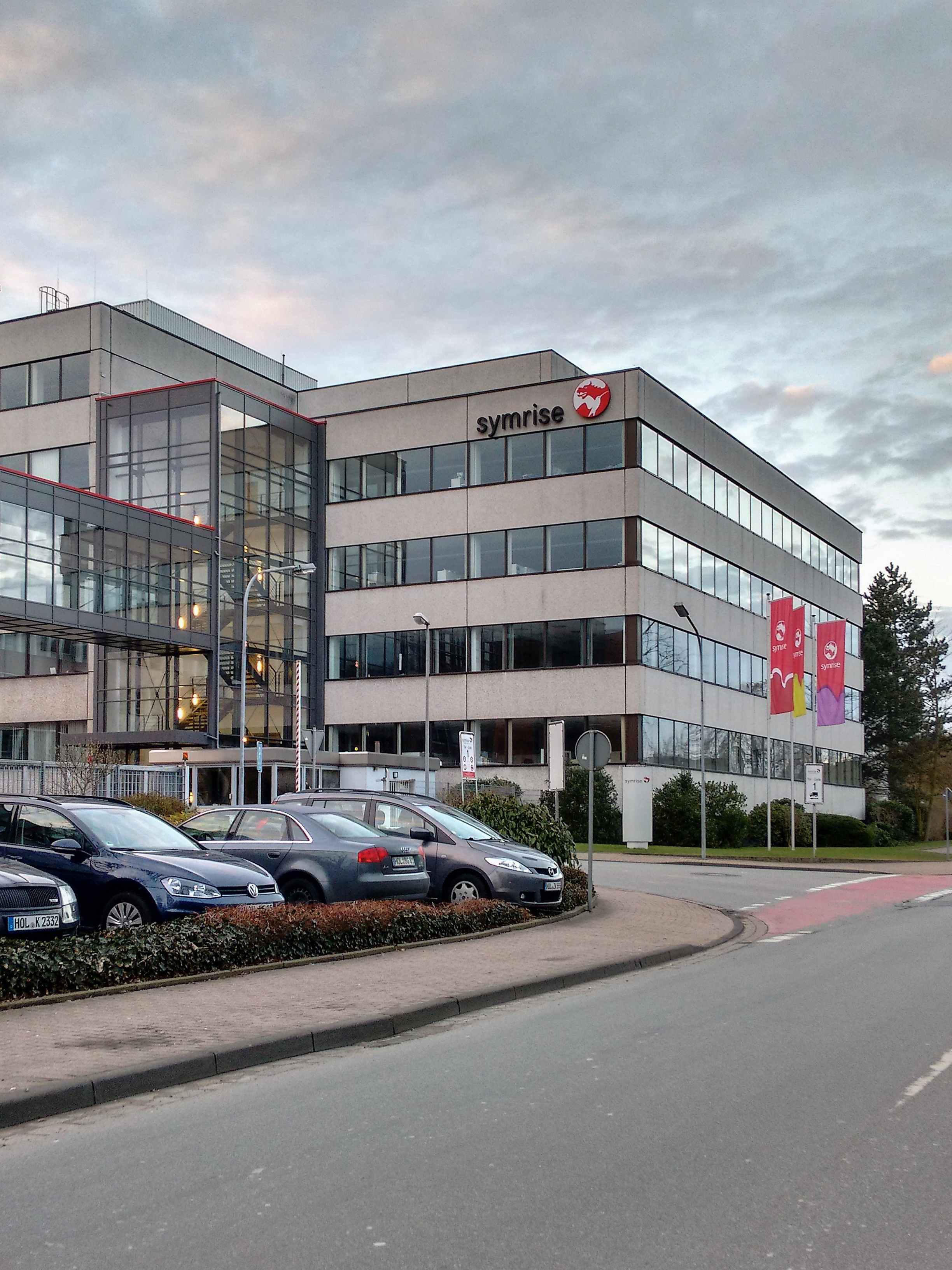 Eingangsbereich zum Werk Weser und der Verwaltung des deutschen Unternehmens Symrise in Holzminden, Niedersachsen.